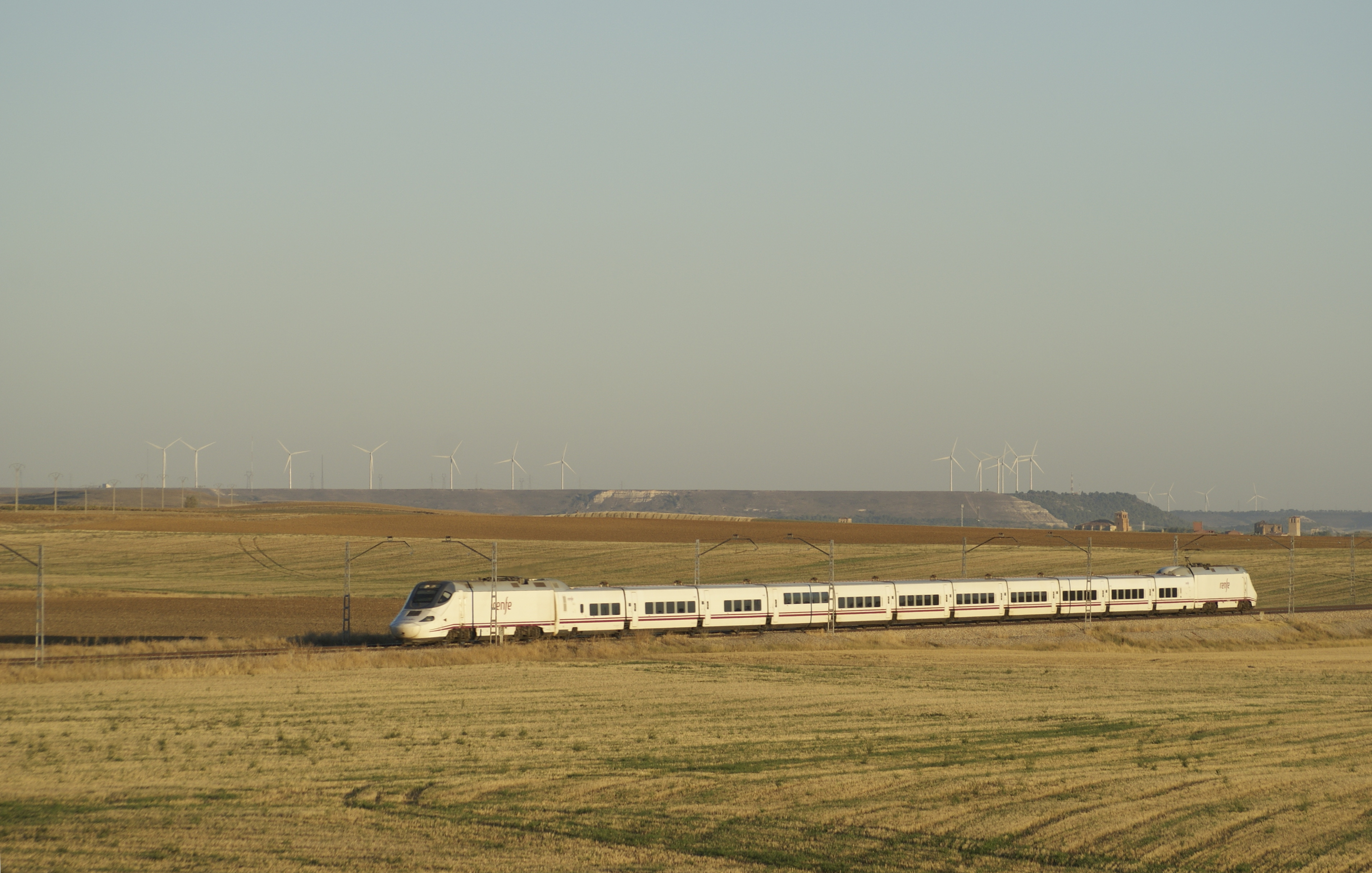 Tren Alvia Serie 130 circulando por la linea convencional Venta de Baños - Gijón en el término municipal de Paredes de Nava.